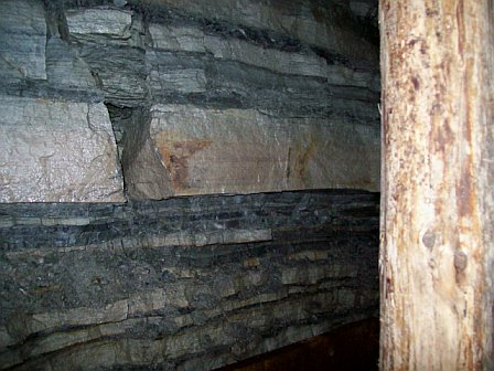 Von 1836 bis 1925 wurde in diesem Stollen [1] Wetzsteinplatten gebrochen. Aus diesen Platten wurden dann zum Schärfen von Sensen und Sicheln Wetzsteine vor Ort gefertigt. Dieser Stollen ist einzigartig in Europa. Normalerweise wurden die Platten im Tagebau abgebaut. 2001 wurde vom Fremdenverkehrsverein Spiegelberg e.V. der Stolleneingang gesucht und gefunden. 2002 der Stolleneingang freigelegt und seither erfolgt der Ausbau zum Besucherstollen.